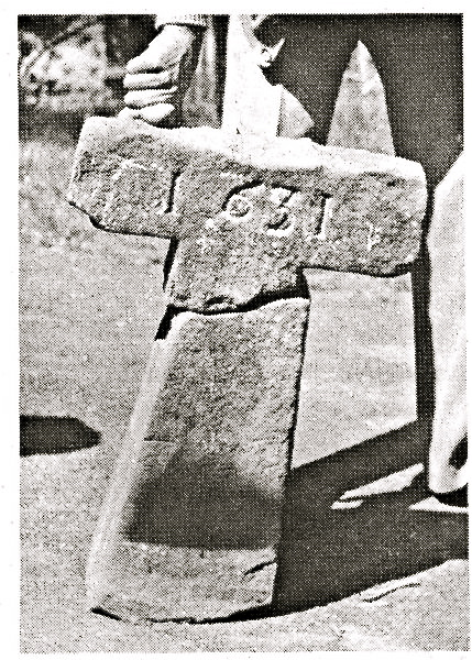 Croisillon de la croix des pestiférés, originellement située dans la chapelle des pestiférés actuellement ruinée - la Haute-Neuveville, Raon-l'Étape 88372